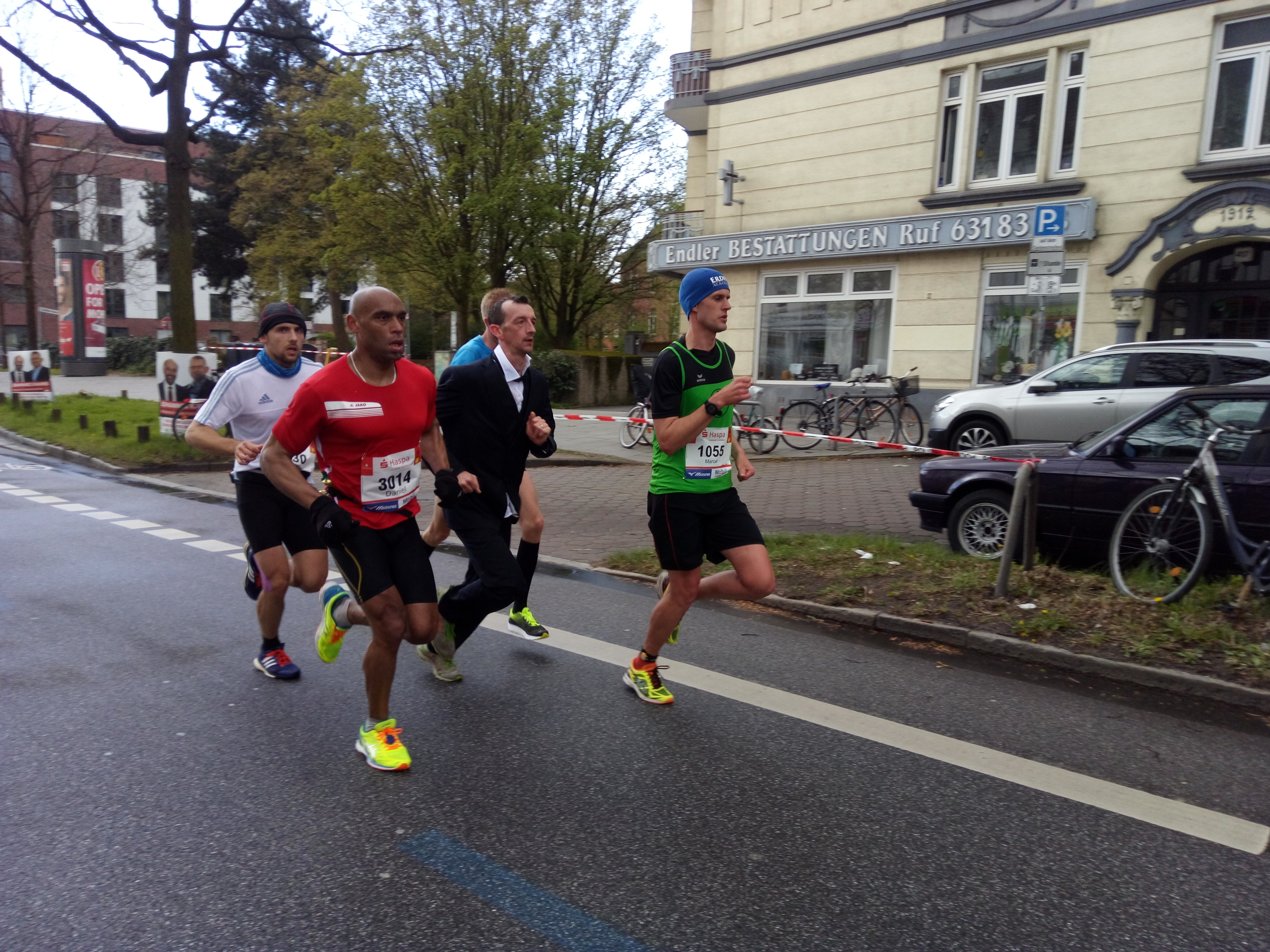 Auch im Anzug war man beim Marathon dabei.